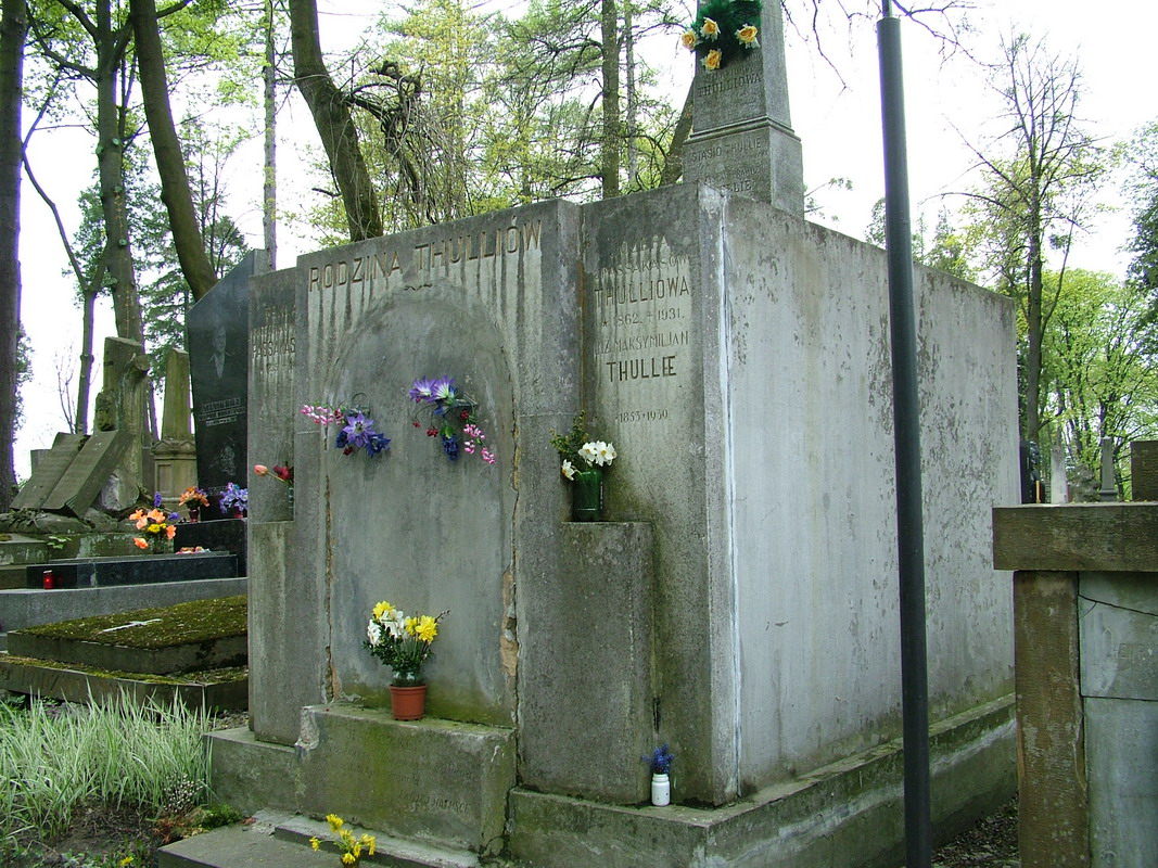 Grób prof. Maksymiliana Thullie i jego rodziny na cmentarzu Łyczakowskim. Maj 2005 Stako